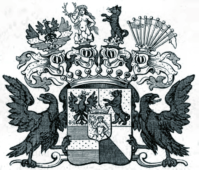 Wappen der Grafen von Clam-Gallas 1768